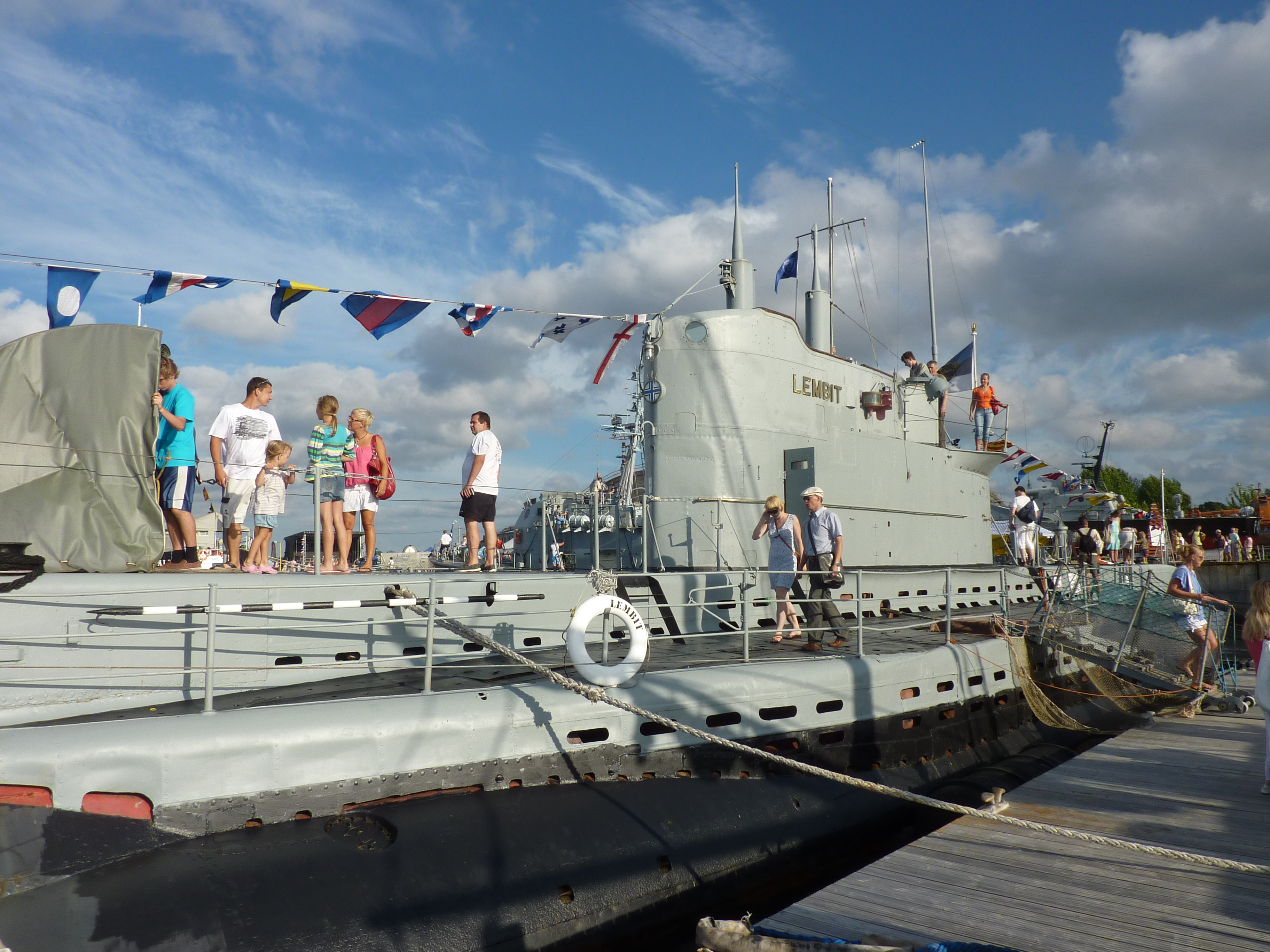 okręt podwodny Lembit